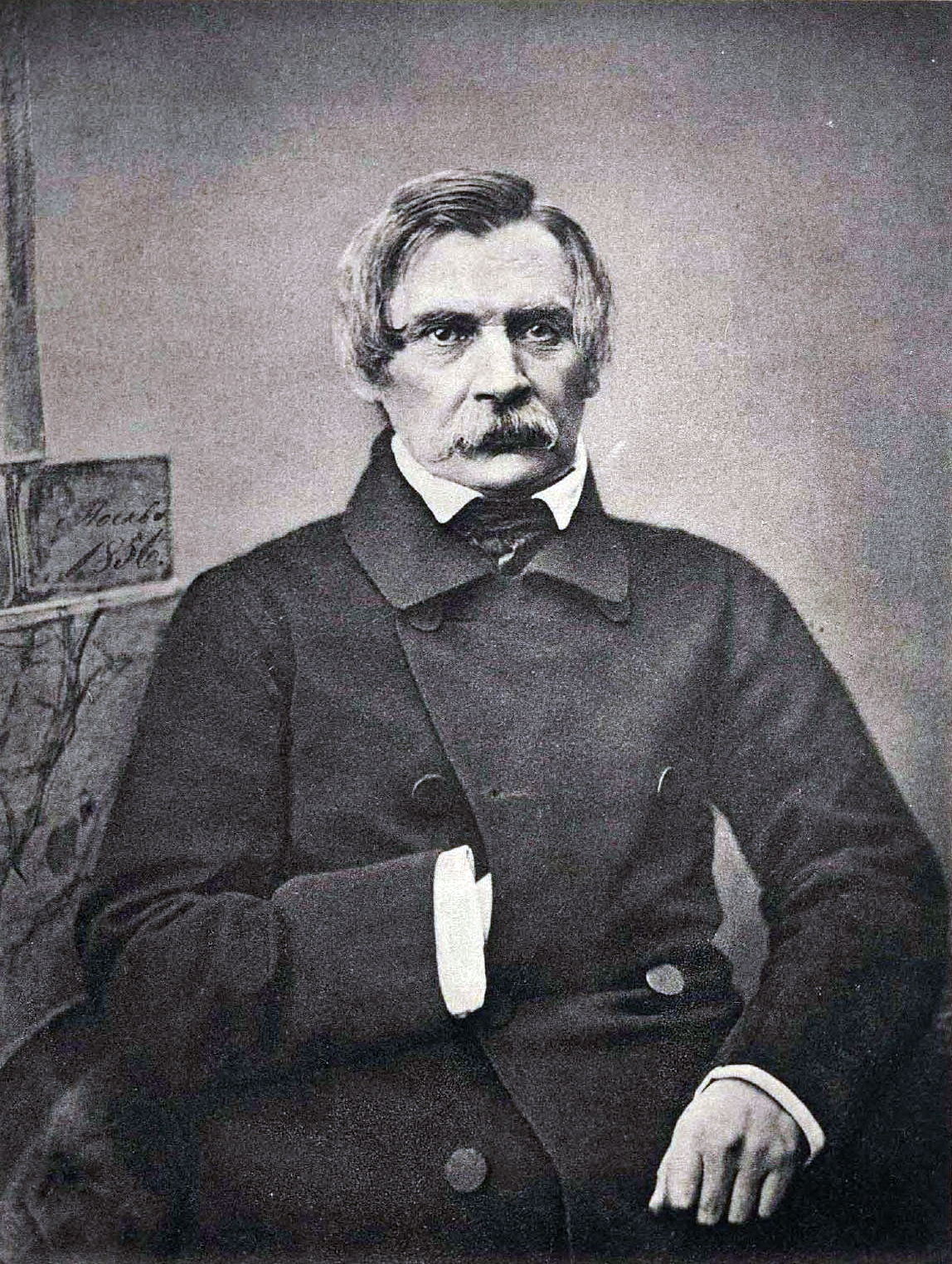 Пущин Иван Иванович. Москва, 1856.